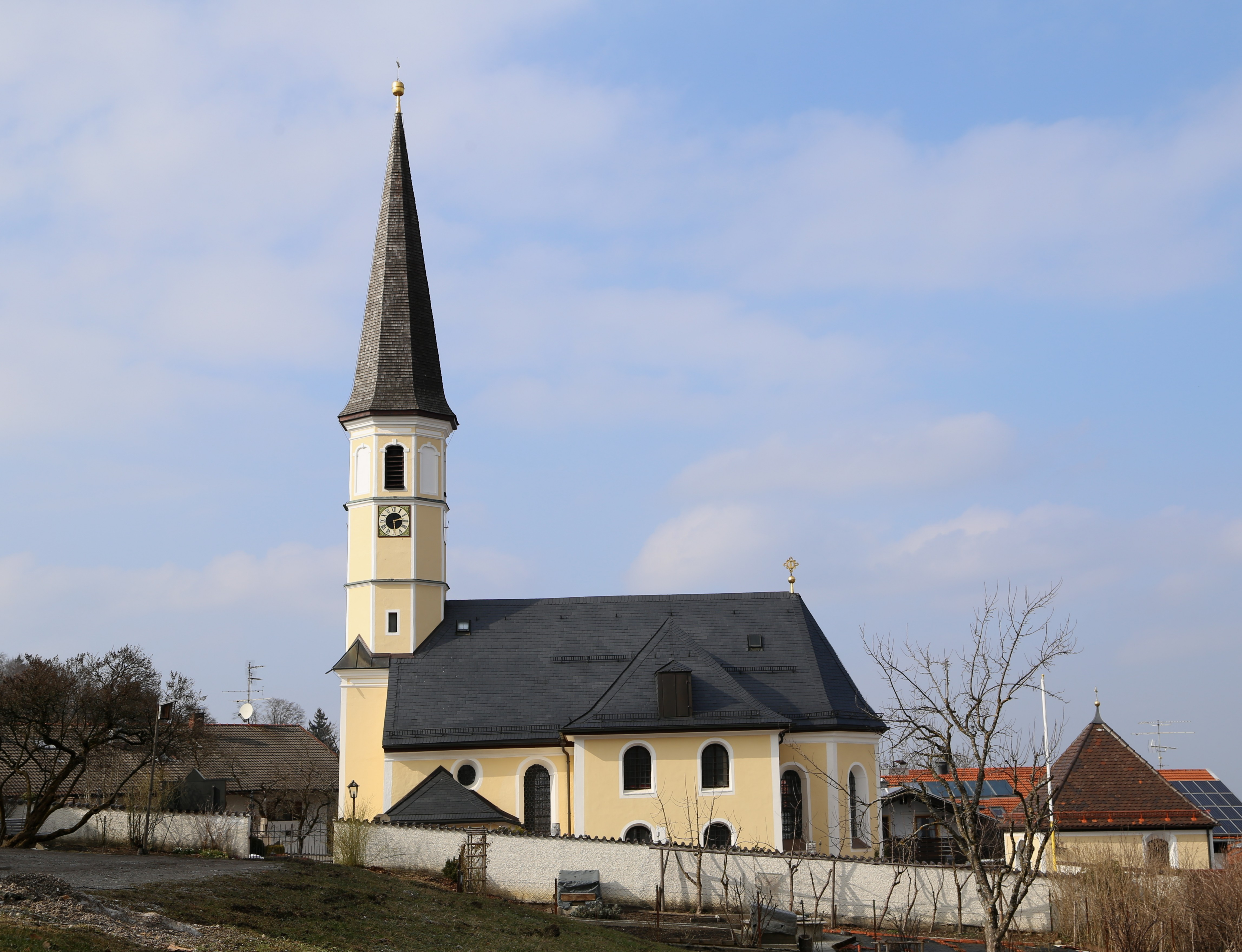 Hittostraße 10, Hittenkirchen; Kath. Filialkirche St. Bartholomäus, Saalbau mit Satteldach, Westturm mit Spitzhelm von 1851 und Steinportal von 1792, Langhaus z. T. romanisch, Chor spätgotisch, barocker Ausbau der Kirche Mitte 17. Jh. und 1760, 1701 Turm von Hans Mayr d.Ä. von der Hausstadt, 1718 Vorhaus, 1843 Dachstuhl, 1898 Erweiterung; mit Ausstattung.